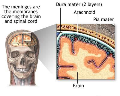 Meninges